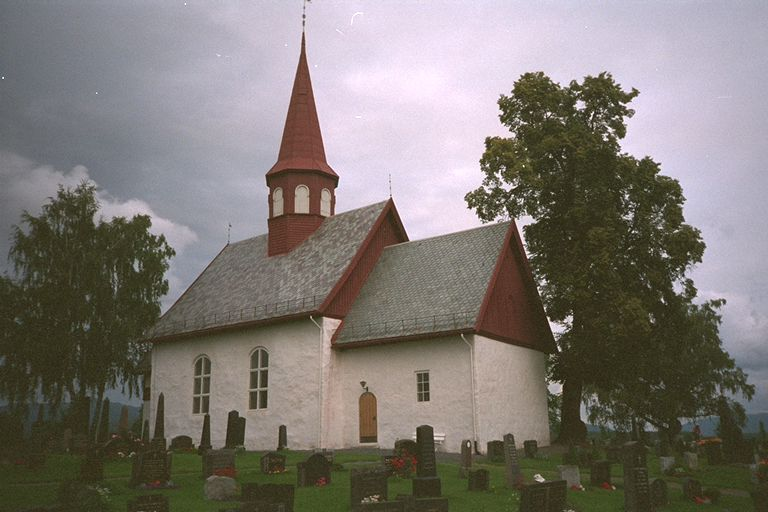 Hedenstad kyrkje frå søraust